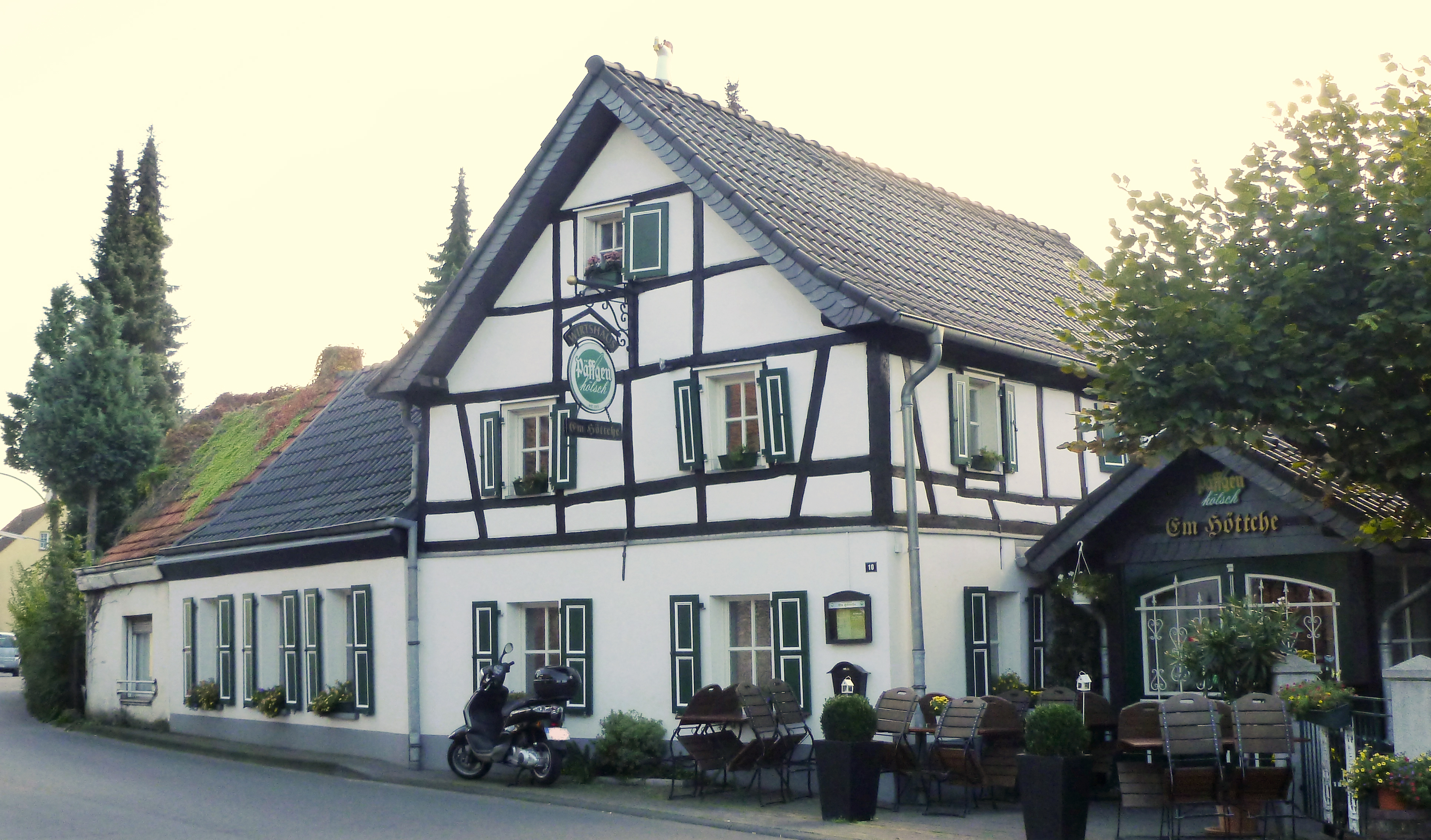 Haus Gierather Str. 10 in Köln-Dellbrück, Denkmal-Nr. 2459, Gaststätte "Em Höttche"